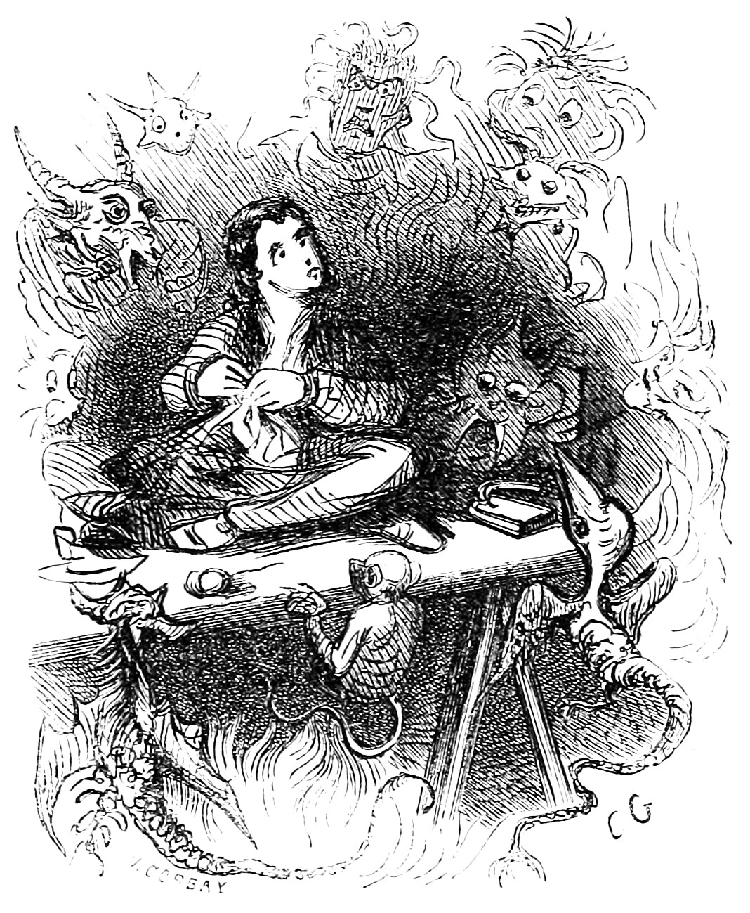 Illustration du Dictionnaire infernal par Louis Le Breton